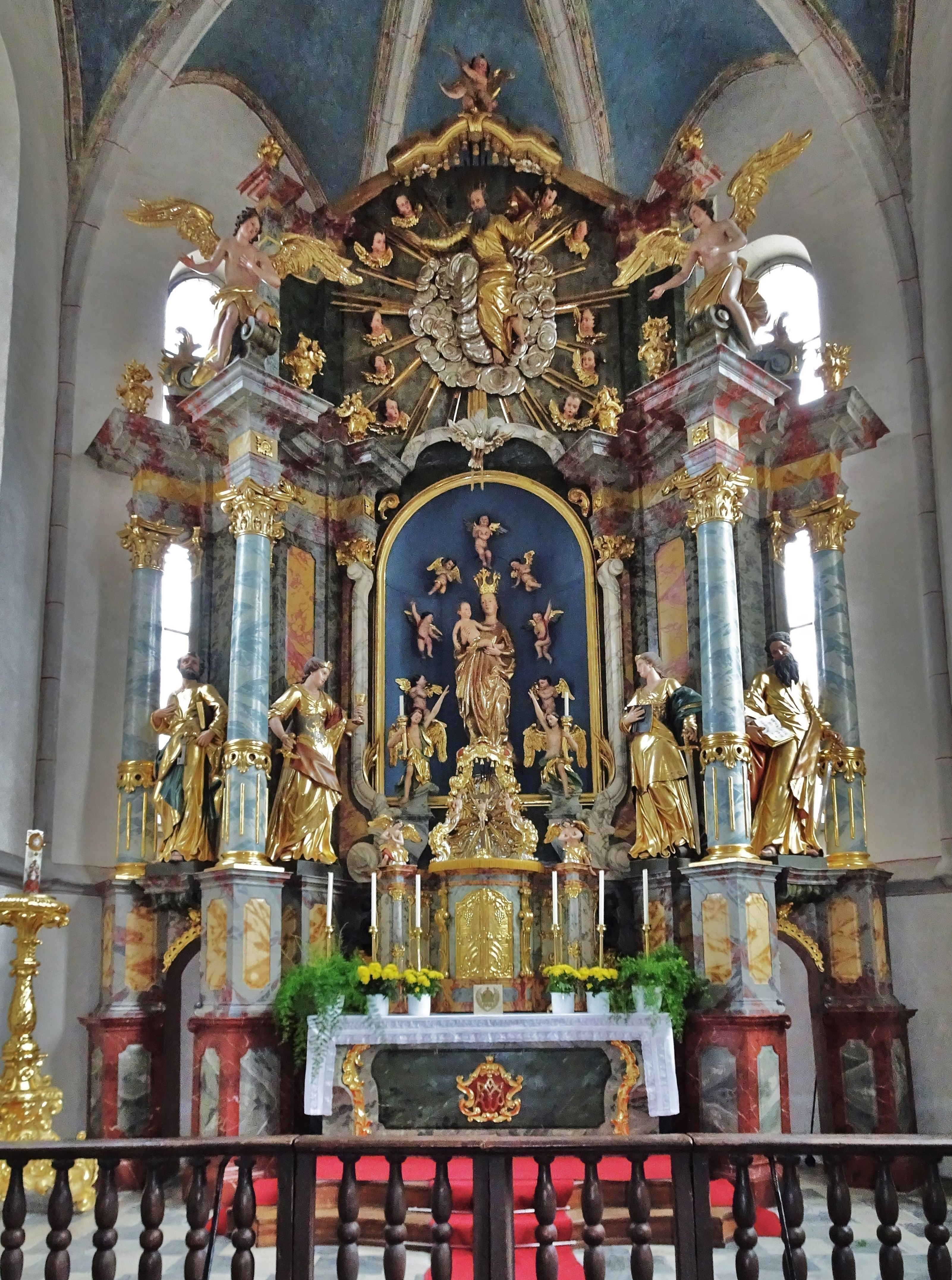 Der Hochaltar der ehemaligen Stiftskirche (Eberndorf)